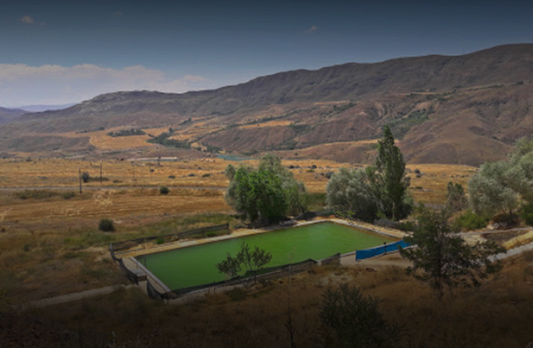 Ortaköy Çermiği - Açık Havuz